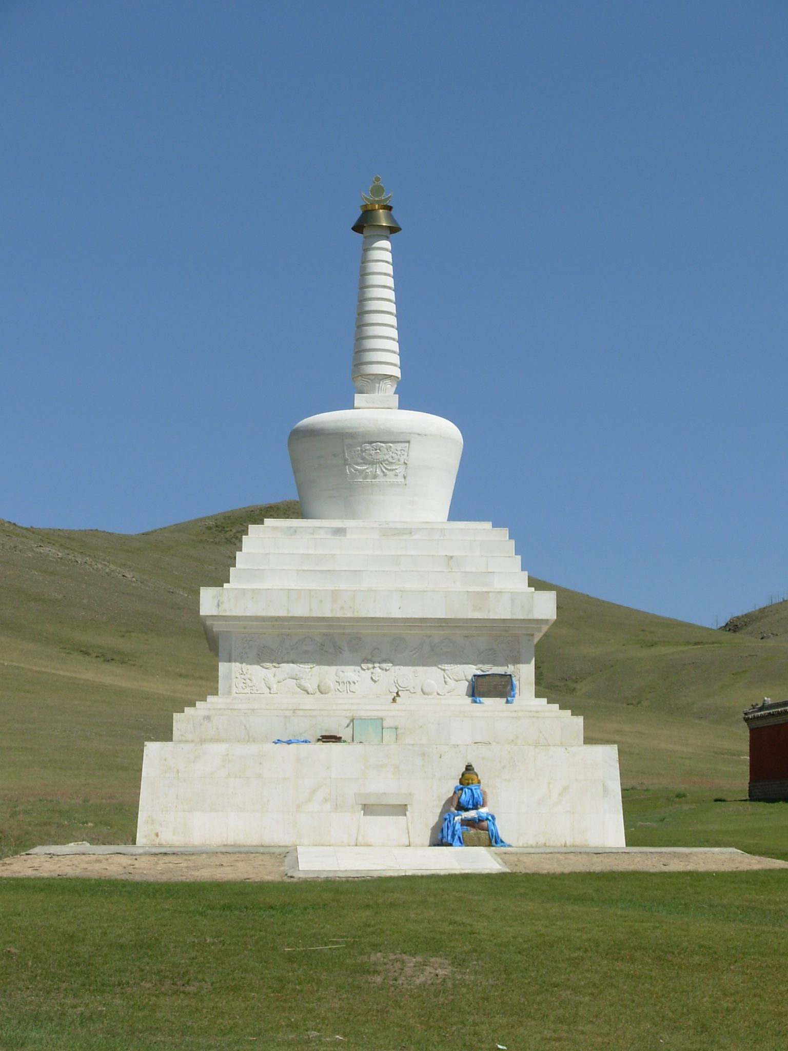 Stupa at Amarbayasgalant Khiid